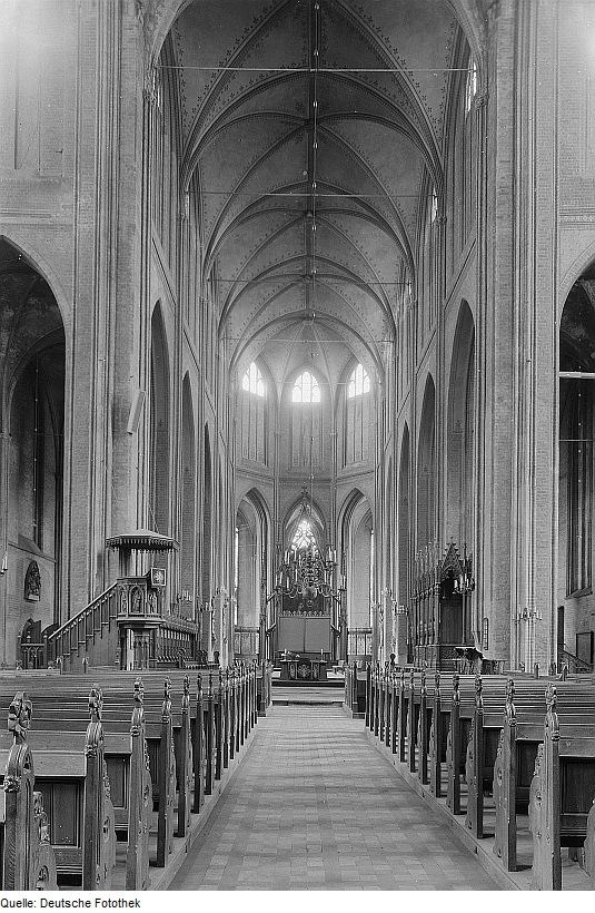 Original image description from the Deutsche Fotothek Schwerin. Dom, Innenansicht mit Blick auf den Altar